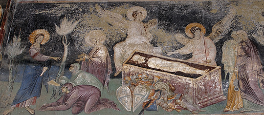 Фреска „Воскресение“ во манастирот во Старо Нагоричане, кумановско, Македонија